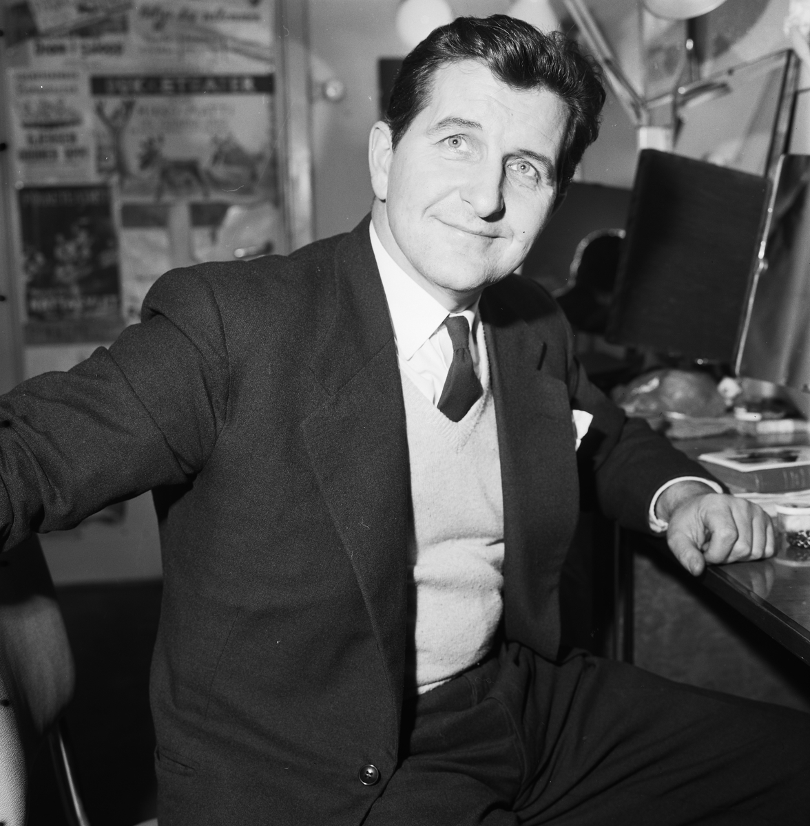 Jack Fjeldstad (født 24. mars 1915 i Oslo, død 4. september 2000) var en norsk skuespiller og sceneinstruktør.